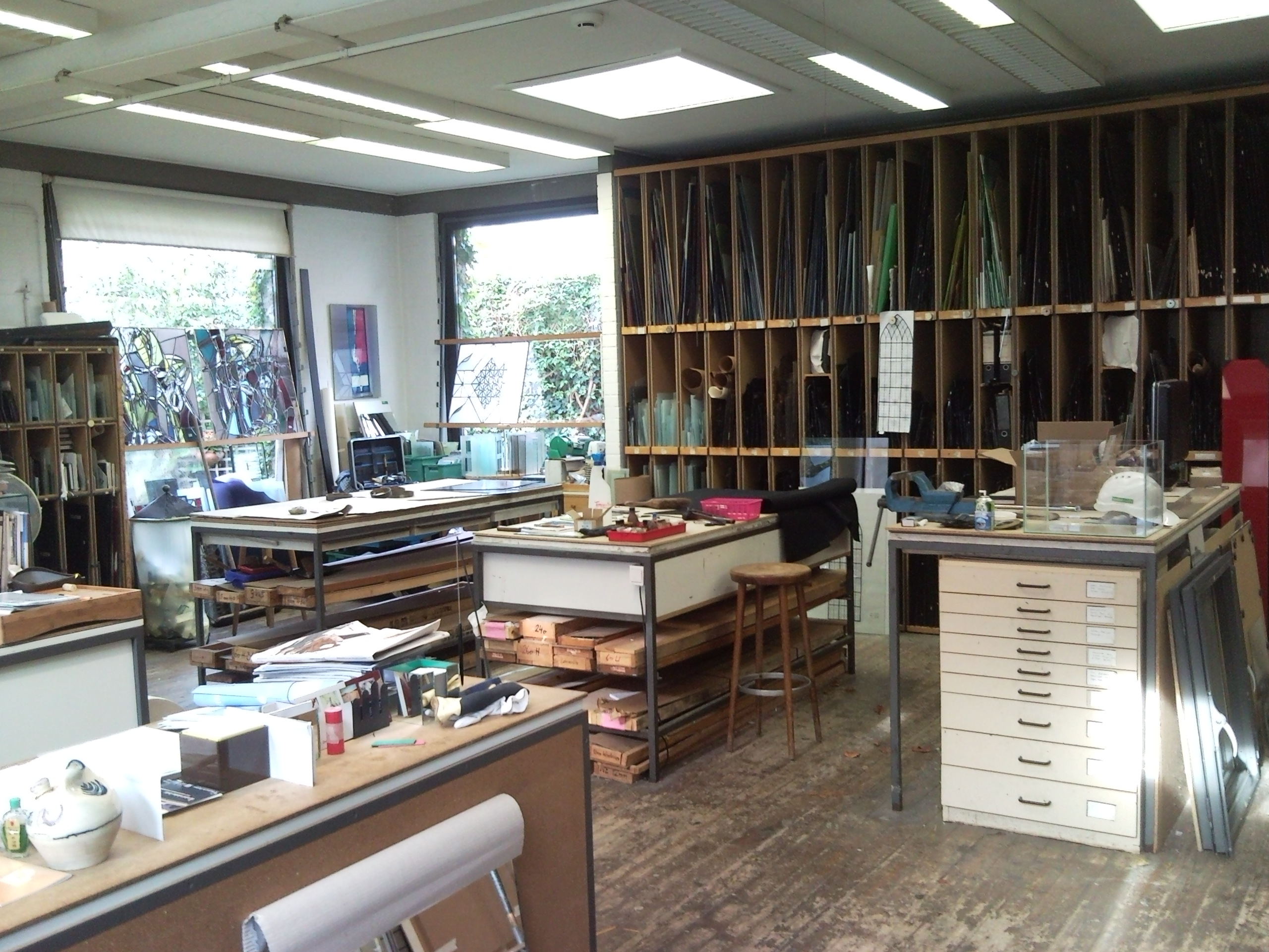 Kunstglaserei